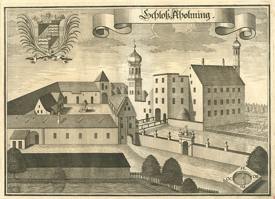 "Schloß Aholming", aus : Beschreibung des Churfürsten- u. Hertzogthumbs Ober- und Nidern Bayrn. Rentamt Landshut. – Gericht Natternberg, 1723